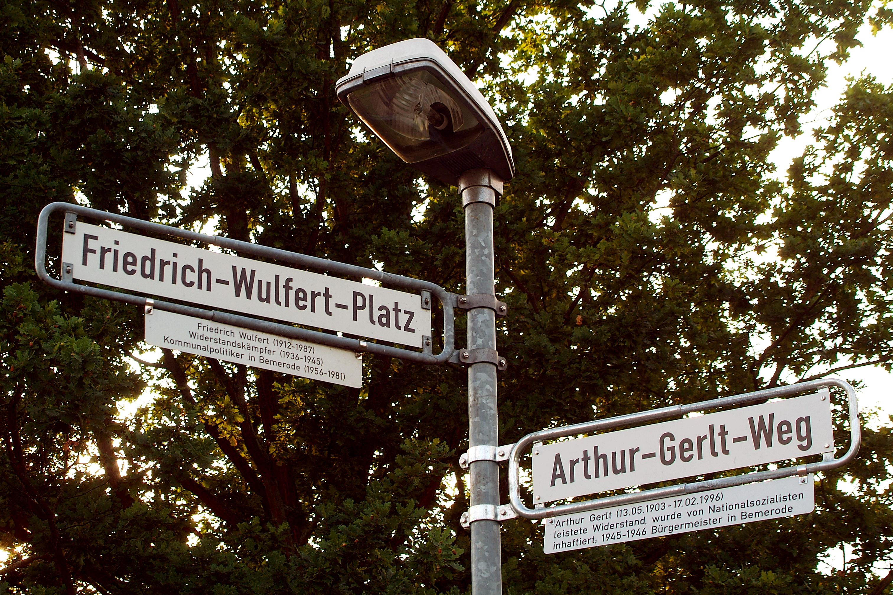 Diese beiden Straßenschilder am Arthur-Gerlt-Weg und dem Friedrich-Wulfert-Platz vor dem Schulzentrum Bemerode geben mit gesondert angebrachten Informationstafeln Hinweise auf das Leben der durch die Namensgebung geehrten Persönlichkeiten: "Friedrich Wulfert (1912-1987), Widerstandskämpfer (1937-1945), Kommunalpolitiker in Bemerode" sowie "Arthur Gerlt (13. 05. 1903 - 17. 02. 1996), leistete Widerstand, wurde von den Nationalsozialisten inhaftiert, 1945 - 1946 Bürgermeister in Bemerode" ...